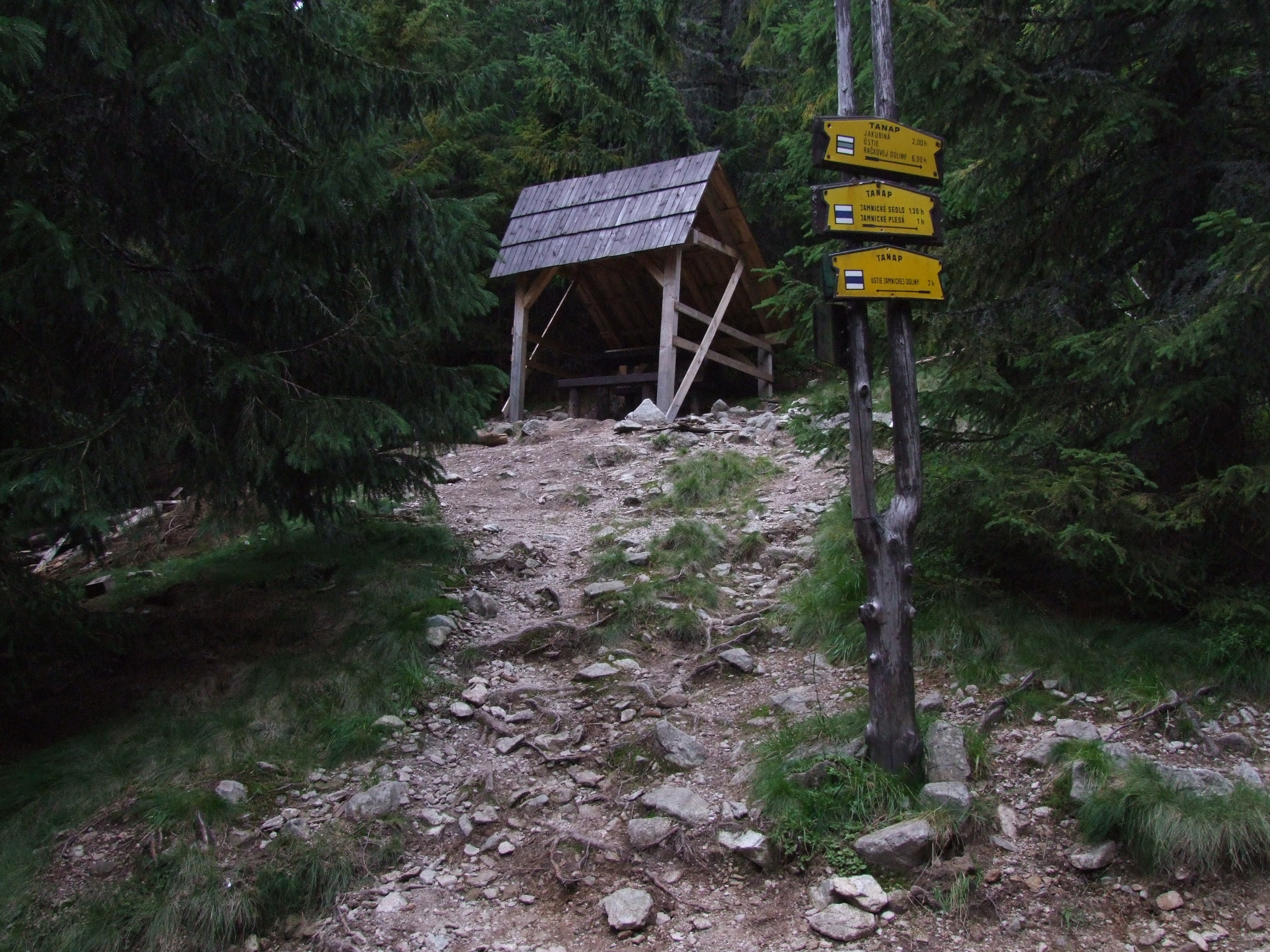 Rozdroże Zahradki w Dolinie Jamnickiej